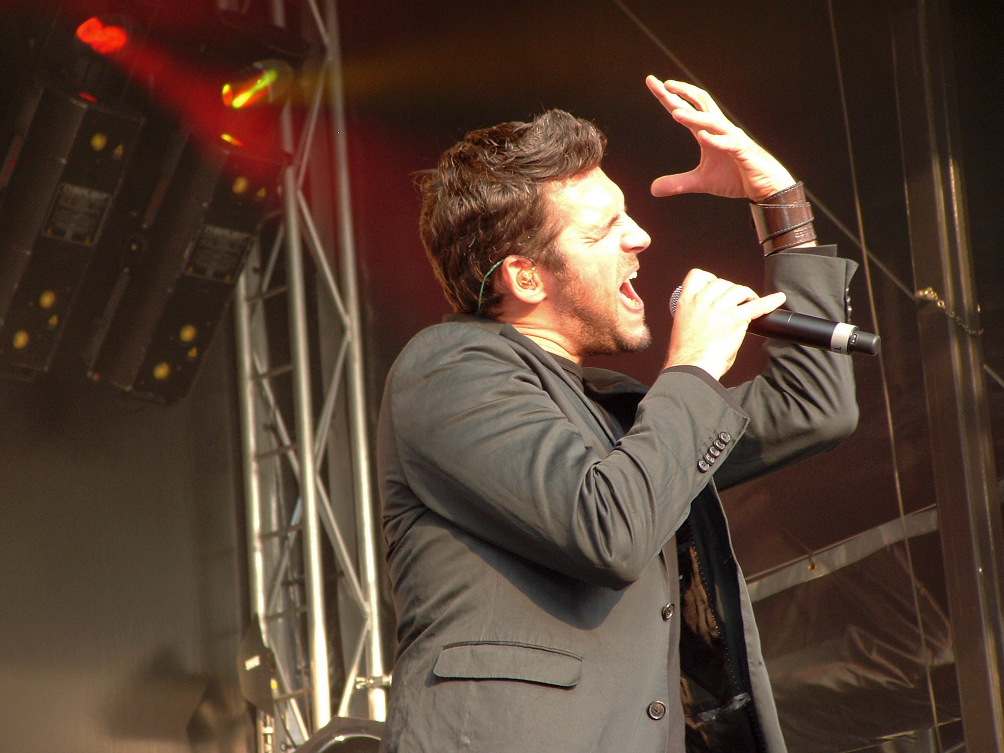 Roel Vanderstukken op Flikkendag 2008 in Gent.